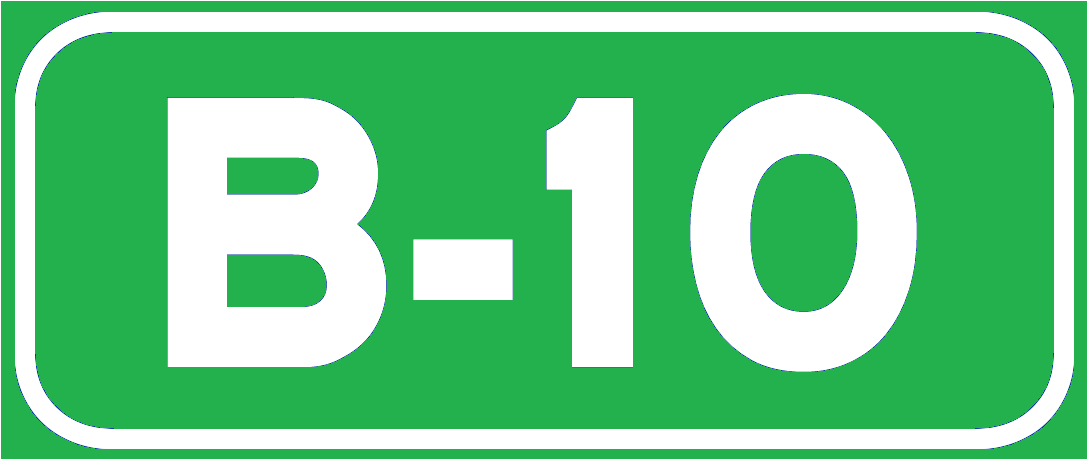 Identificador de la Autovía B-10